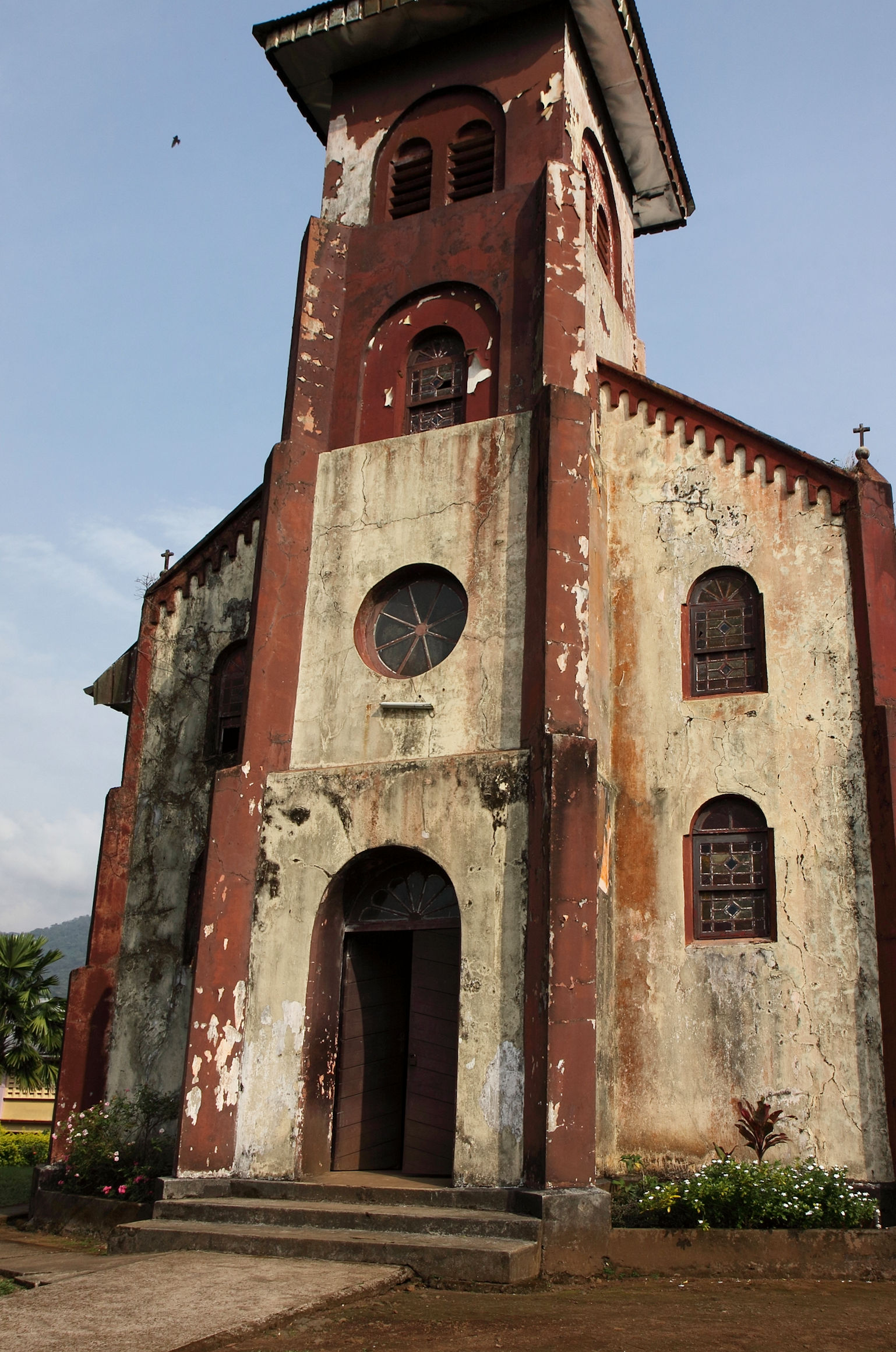 L'église de Bonjongo (ou Bodjongo), près du mont Cameroun, la plus vieille du pays.